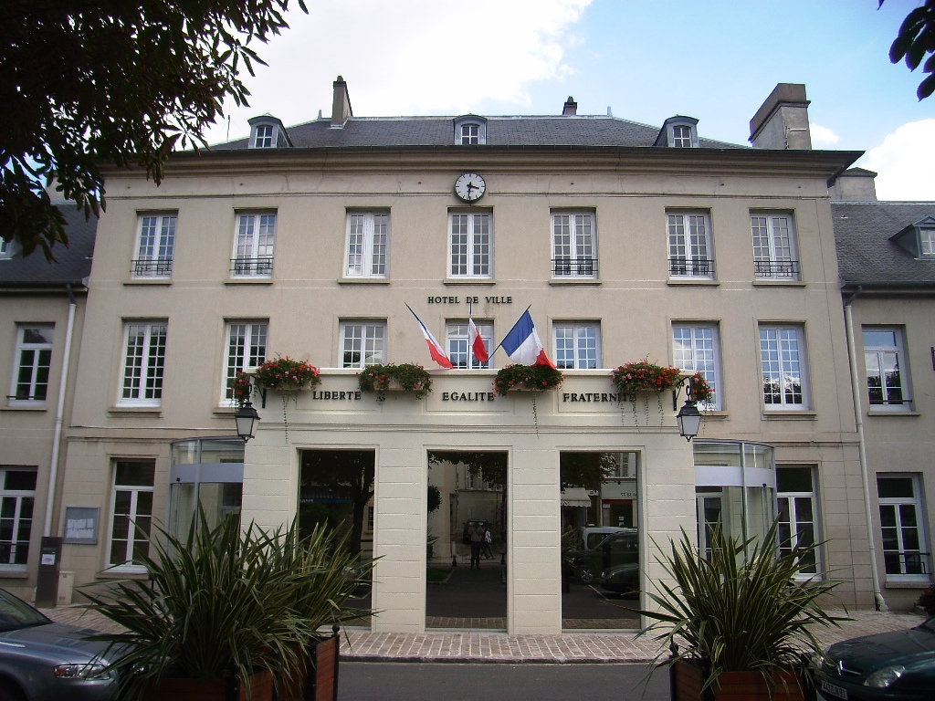 Hôtel de Ville de Palaiseau, façade nord